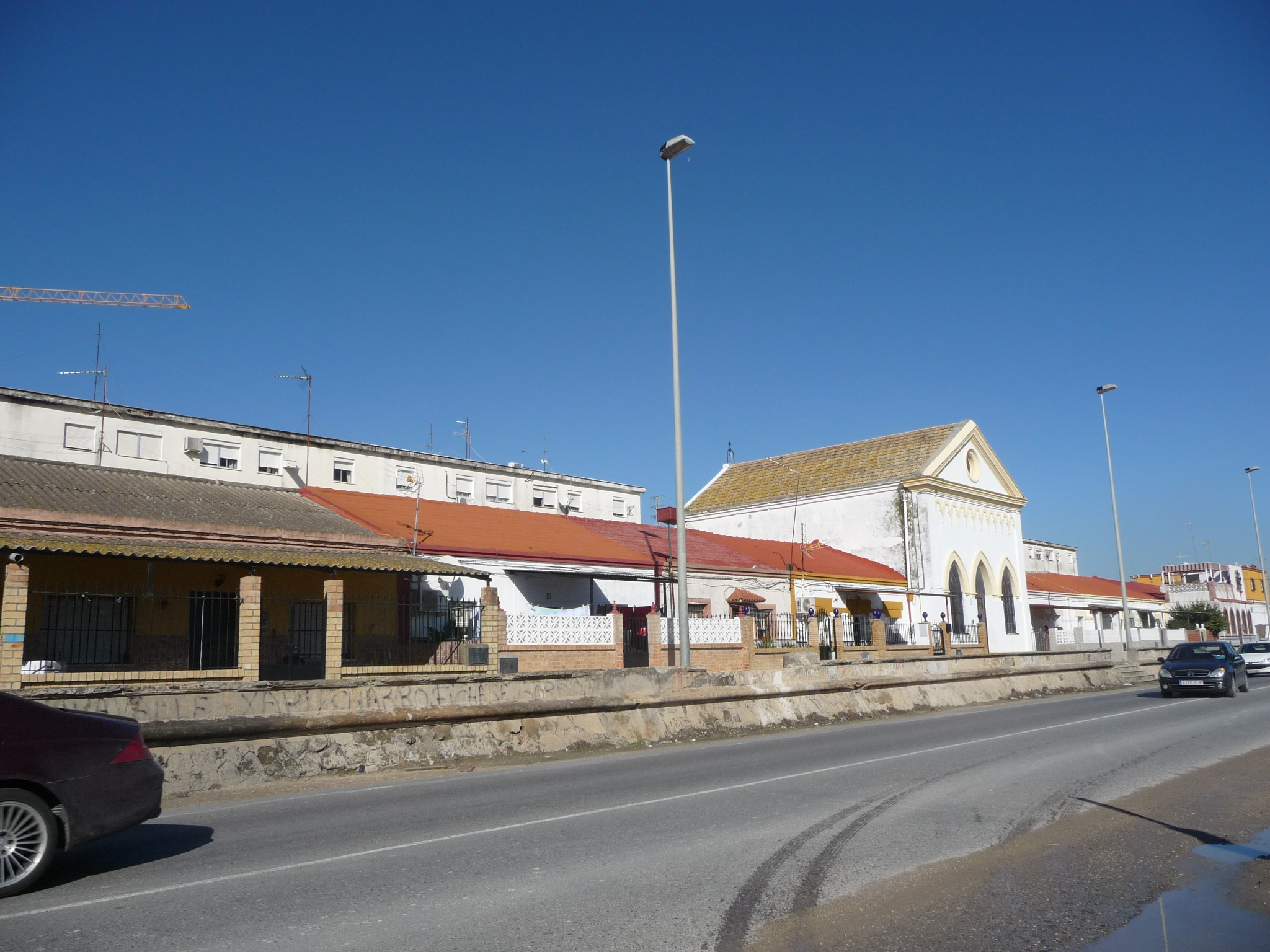 El Portal, Jerez (Andalucía, España)